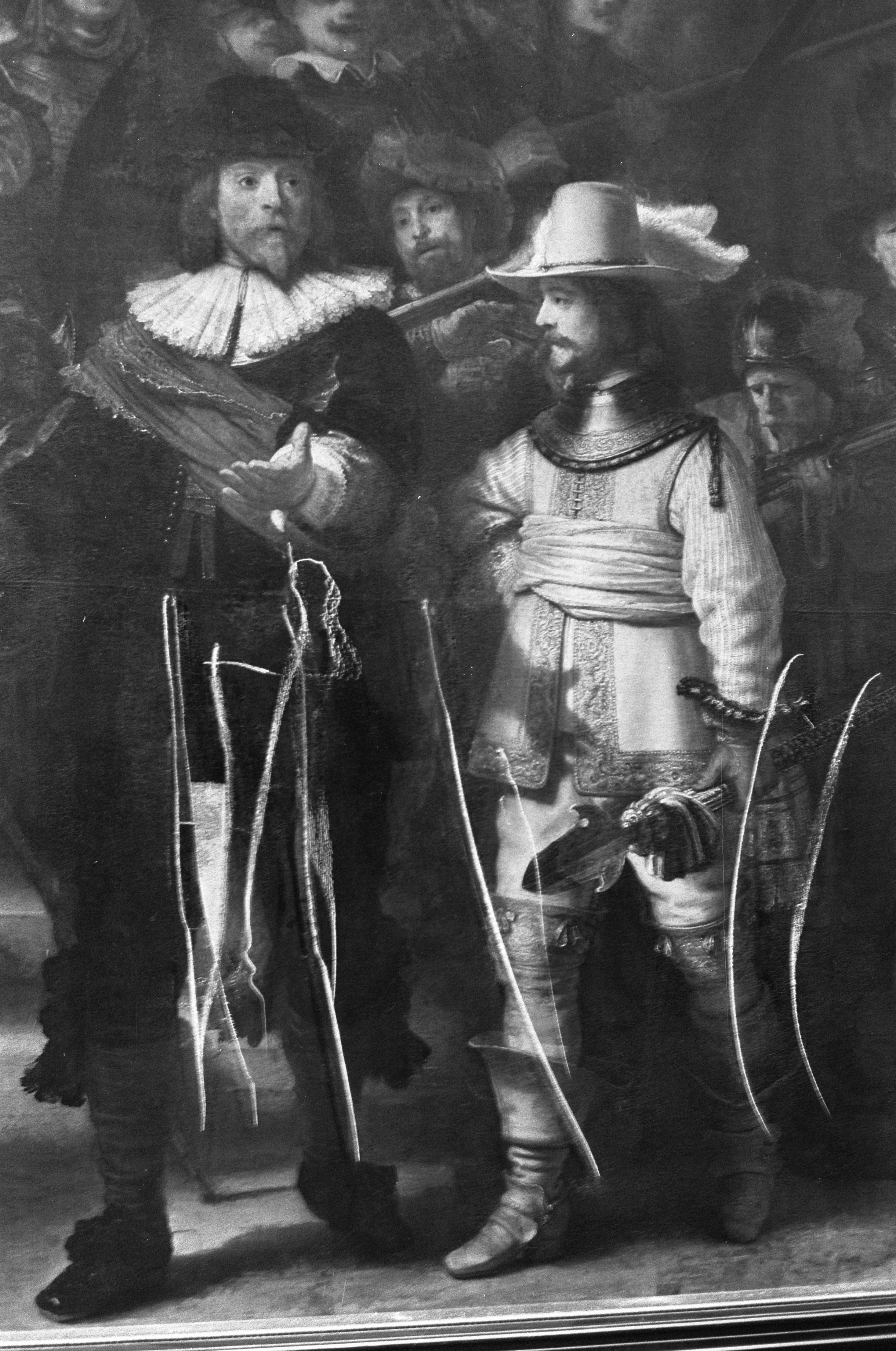 Collectie / Archief : Fotocollectie Anefo Reportage / Serie : [ onbekend ] Beschrijving : Nachtwacht van Rembrandt beschadigd; detail met enkele krassen Datum : 14 september 1975 Trefwoorden : schilderijen Persoonsnaam : Rijn, Rembrandt van Fotograaf : Bogaerts, Rob / Anefo Auteursrechthebbende : Nationaal Archief Materiaalsoort : Negatief (zwart/wit) Nummer archiefinventaris : bekijk toegang 2.24.01.05 Bestanddeelnummer : 928-1536